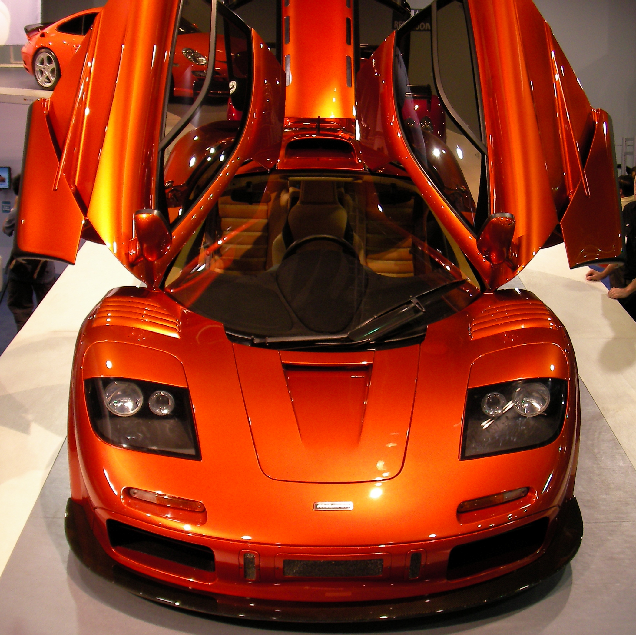 McLaren F1